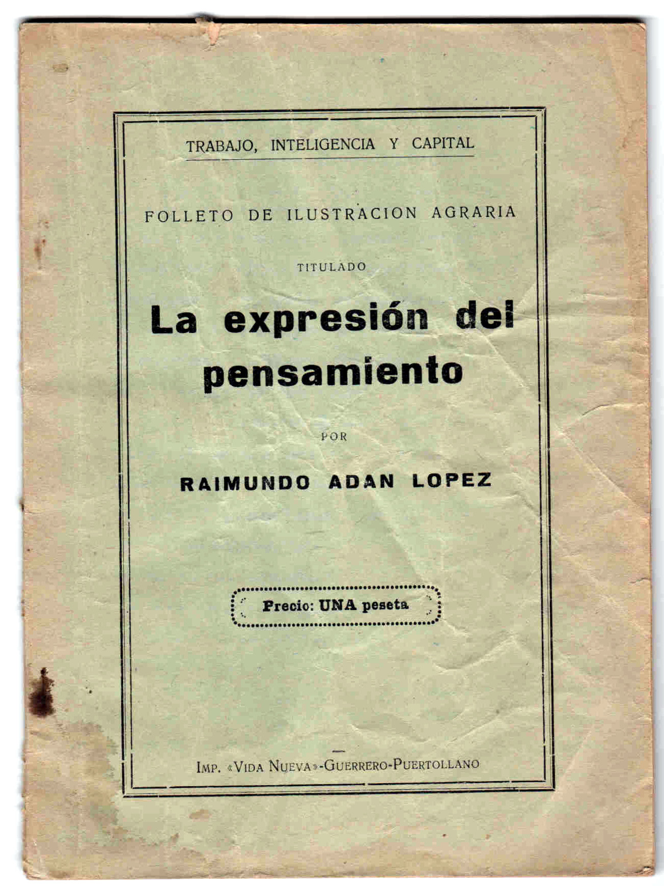 Portada del libro "La Expresión del Pensamiento", de Raimundo Adán López.